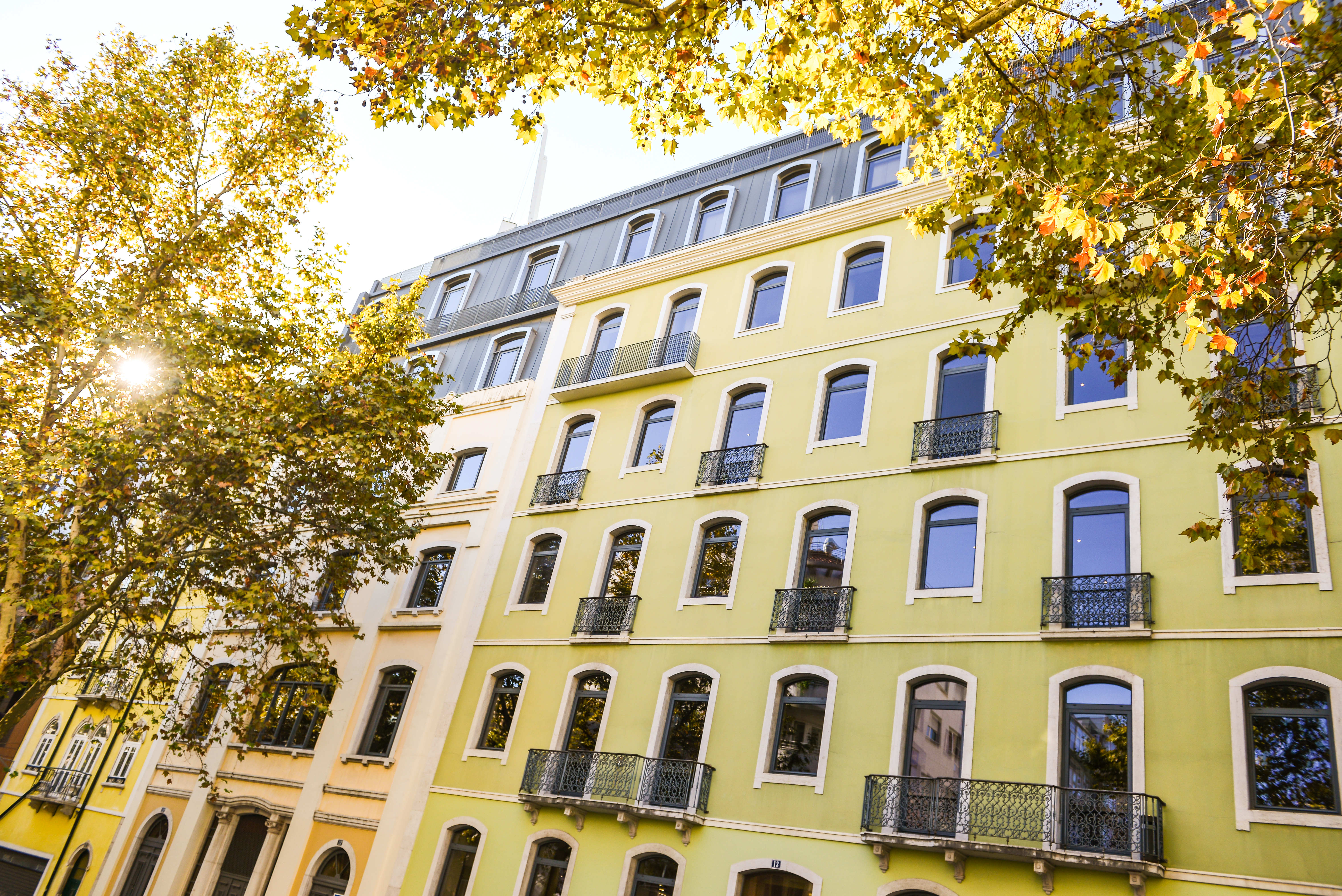 Headquarters da Saphety, em Lisboa.